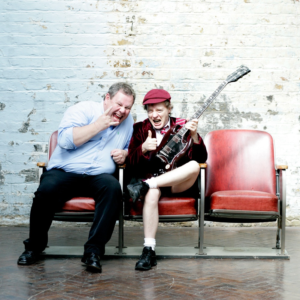 Guido Karp and Angus Young of ACDC, © Michael Koelsch für GKP